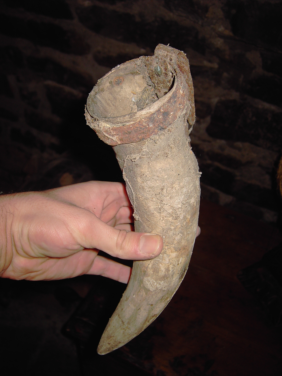 Un escopulión de cuerno, el recipiente donde se depositaba la piedra de afilar el dallo durante la siega para poderla transportar colgada del cinturón.